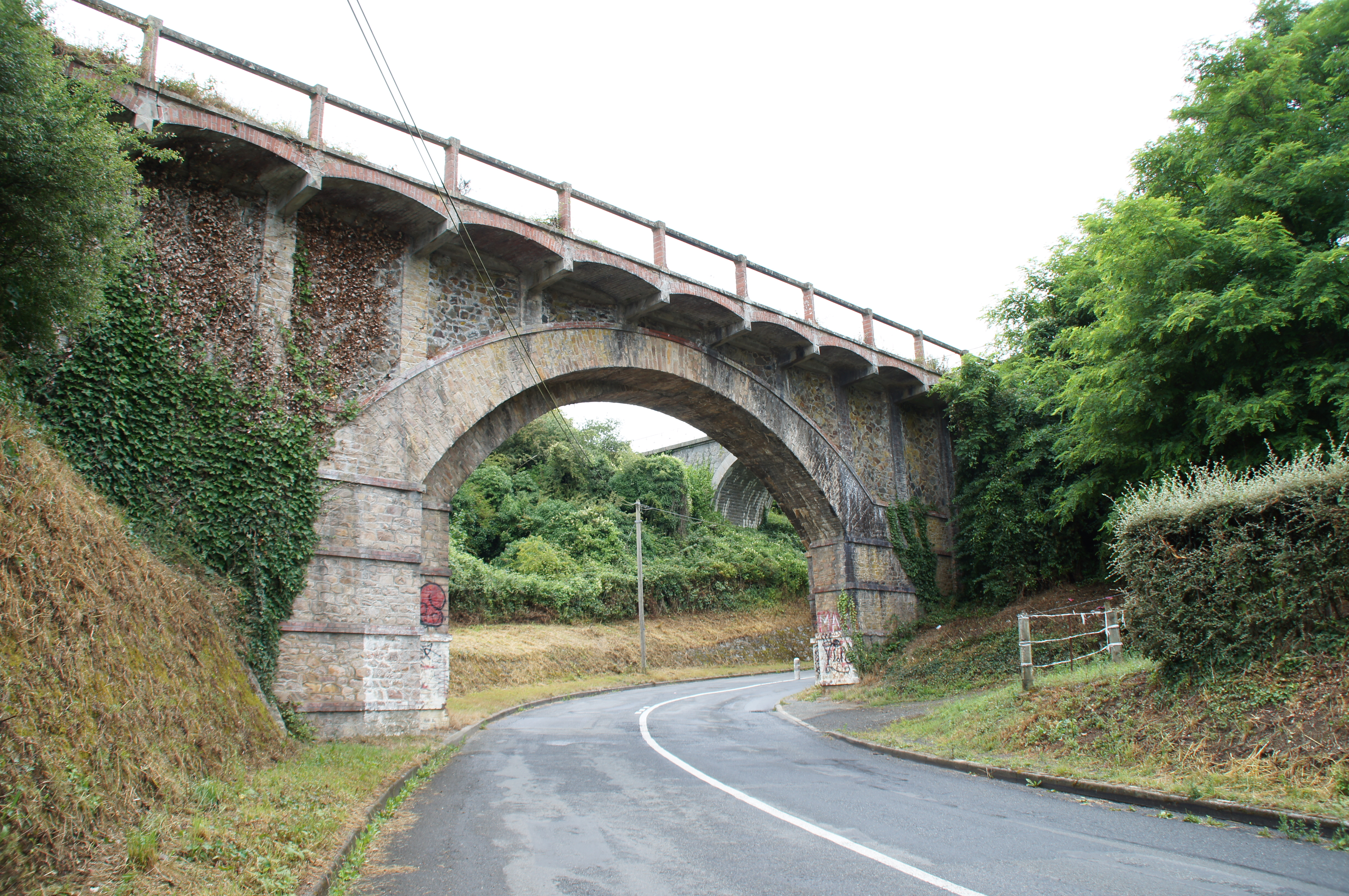 Die derzeit ungenutzte Eisenbahnbrücke der früheren Schmalspurbahn über die route des Courses in St-Brieuc, Zustand 2015